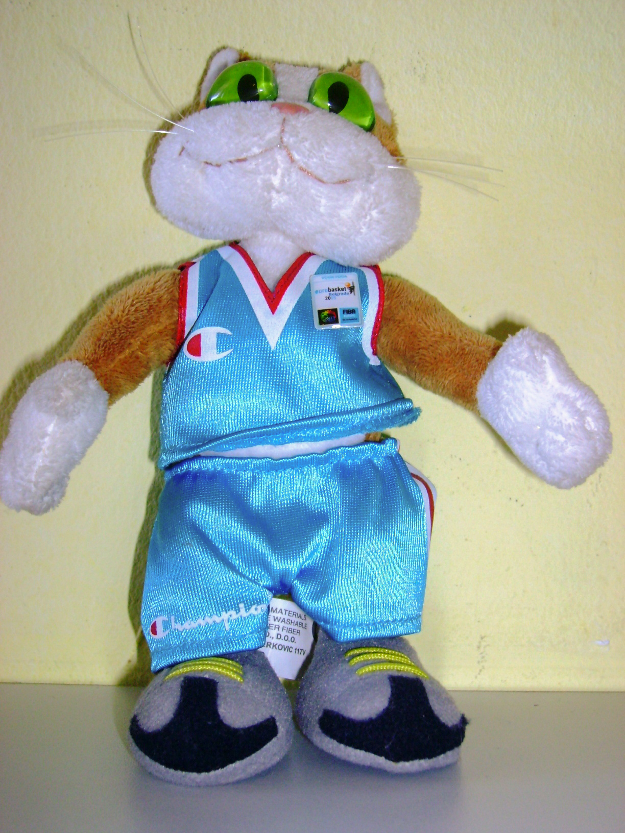 Maskota Evropskog prvenstva u kosaci 2005.